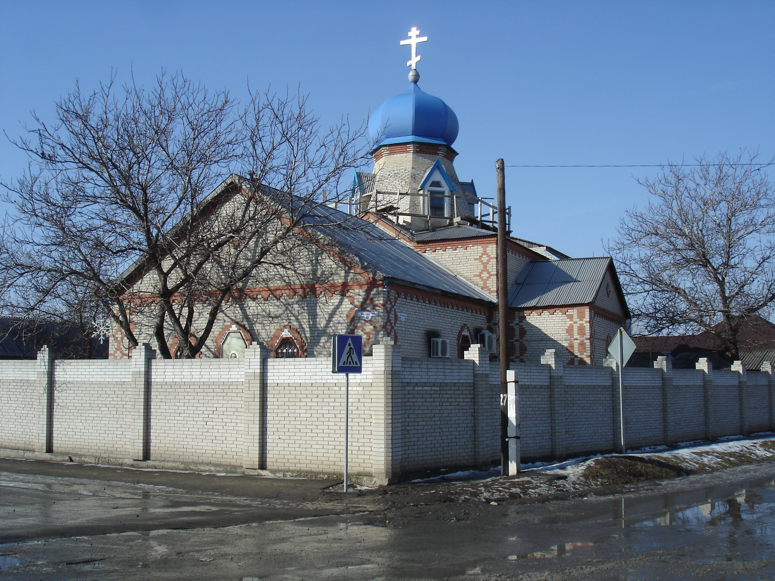 Посёлок Глубокий, Ростовская область - церковь Пантелеимона Целителя.